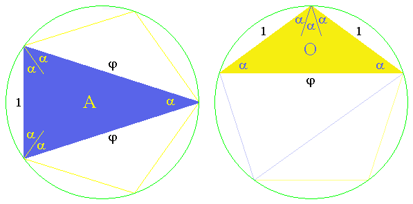 Les deux types de triangles d'or (et leur obtention par découpage d'un pentagone régulier) (image personnelle)Papy77 2 décembre 2005 à 17:07 (CET)